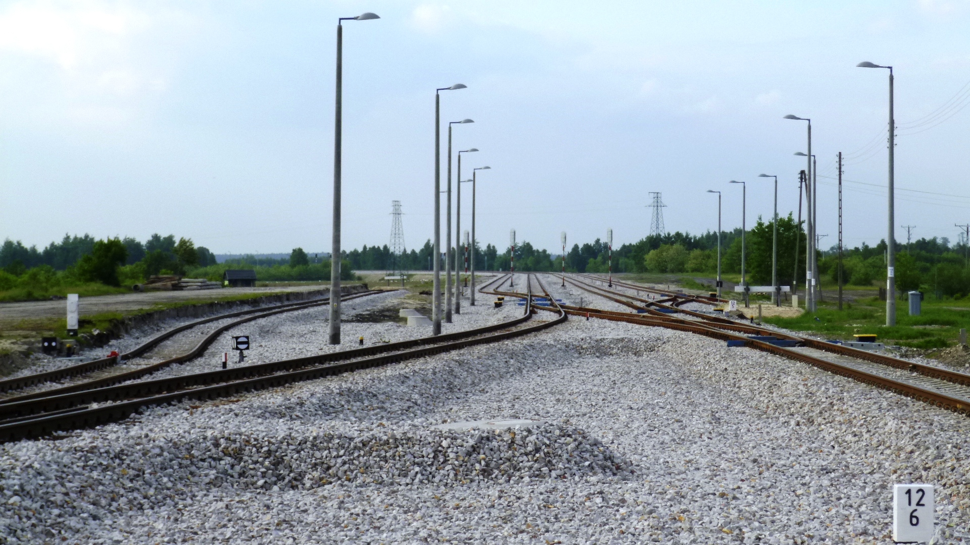 Dęba Rozalin 25-05-2013